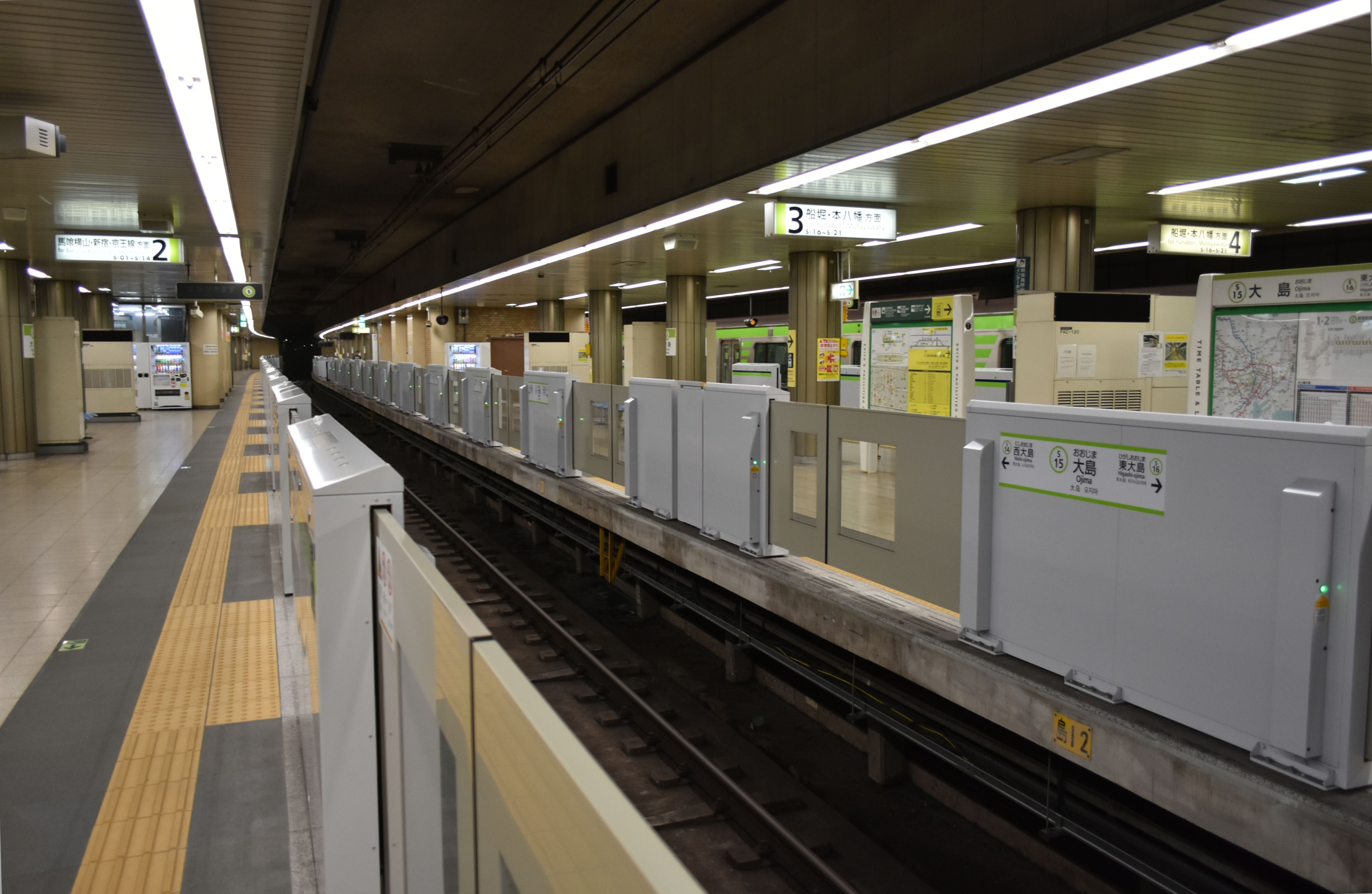 都営新宿線 大島駅